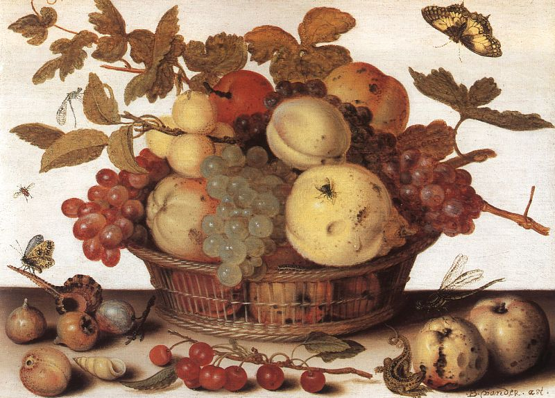 Fruit Basket